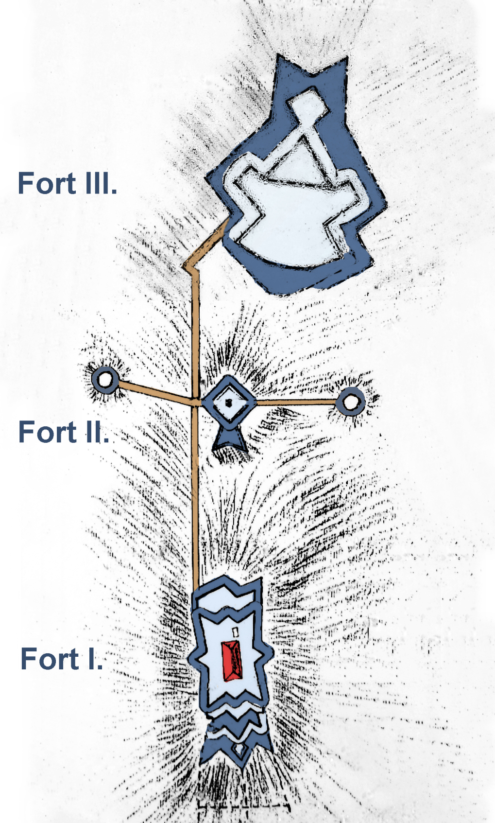 Plan der Befestigungsanlagen (nachträglich eingefärbt) auf dem Klüt mit seinen drei Forts um 1784, sowie 2 Wachtürmen bei Fort II. Die Darstellung ist nicht maßstabsgerecht, die Verbindungsgänge sind verkürzt dargestellt.